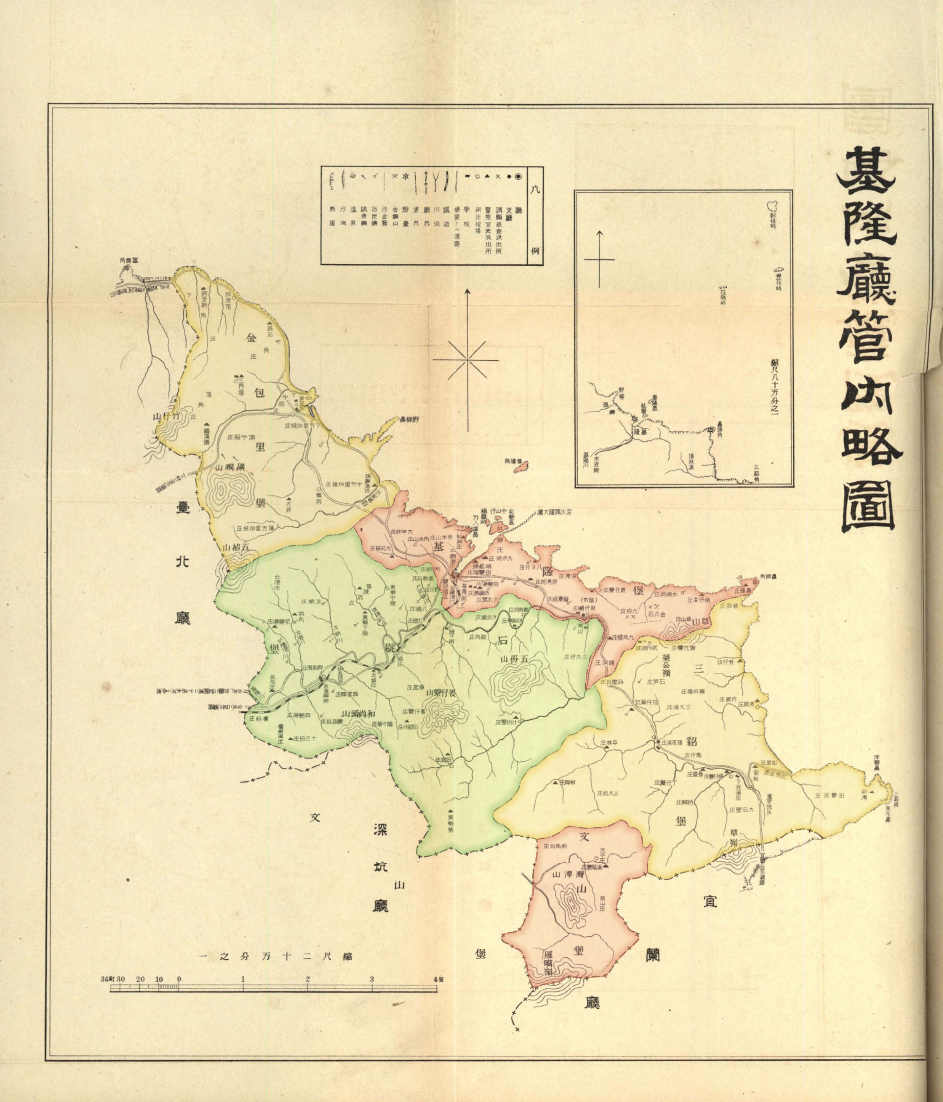 基隆廳管內略圖 (1901年至1909年間)